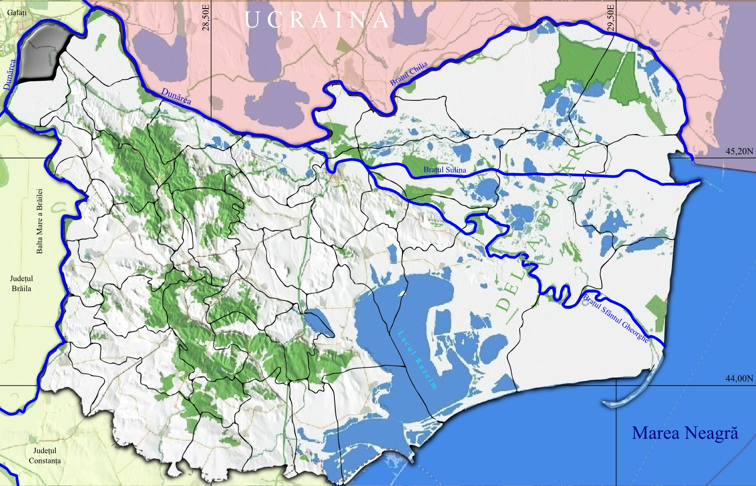 I.C. Bratianu jud Tulcea.